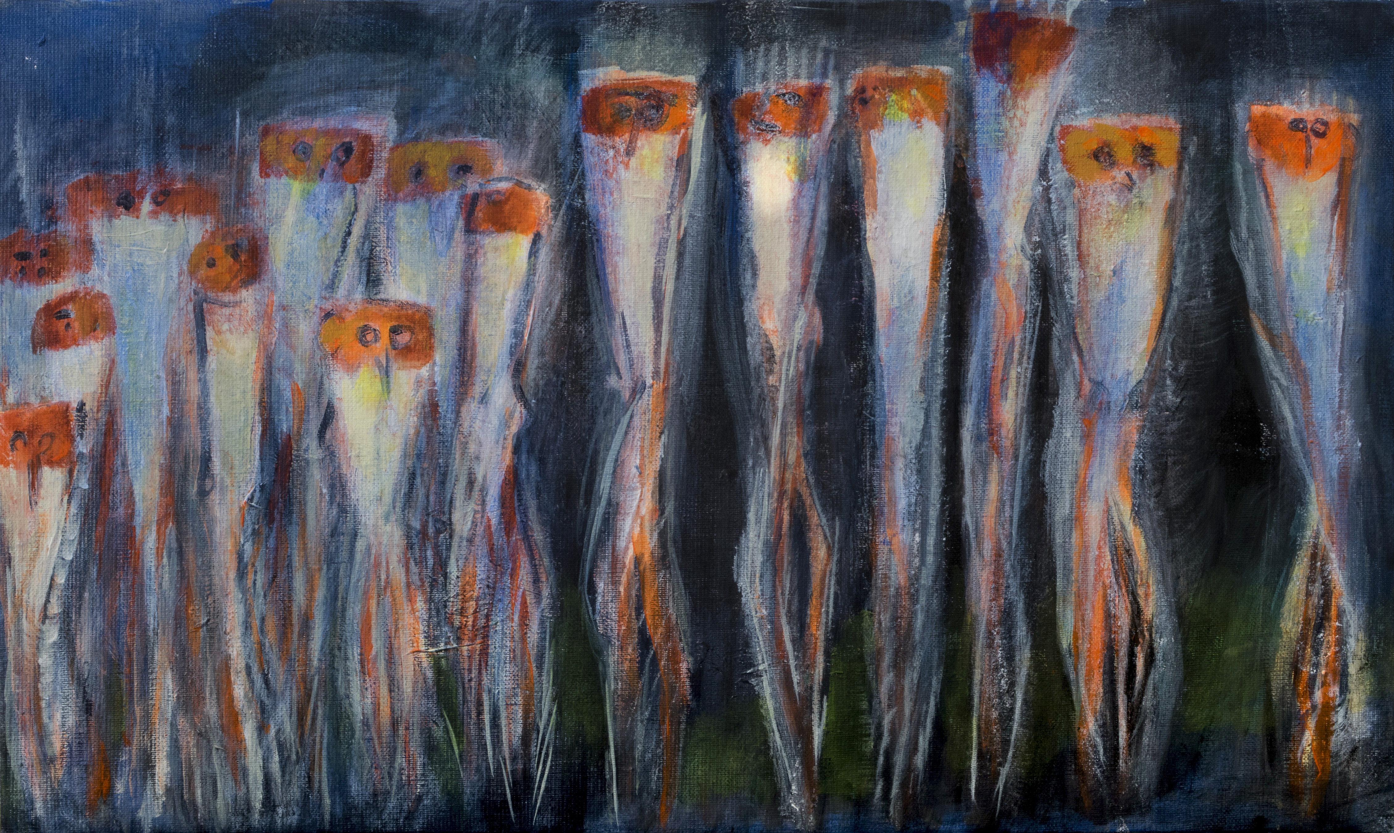 tableau